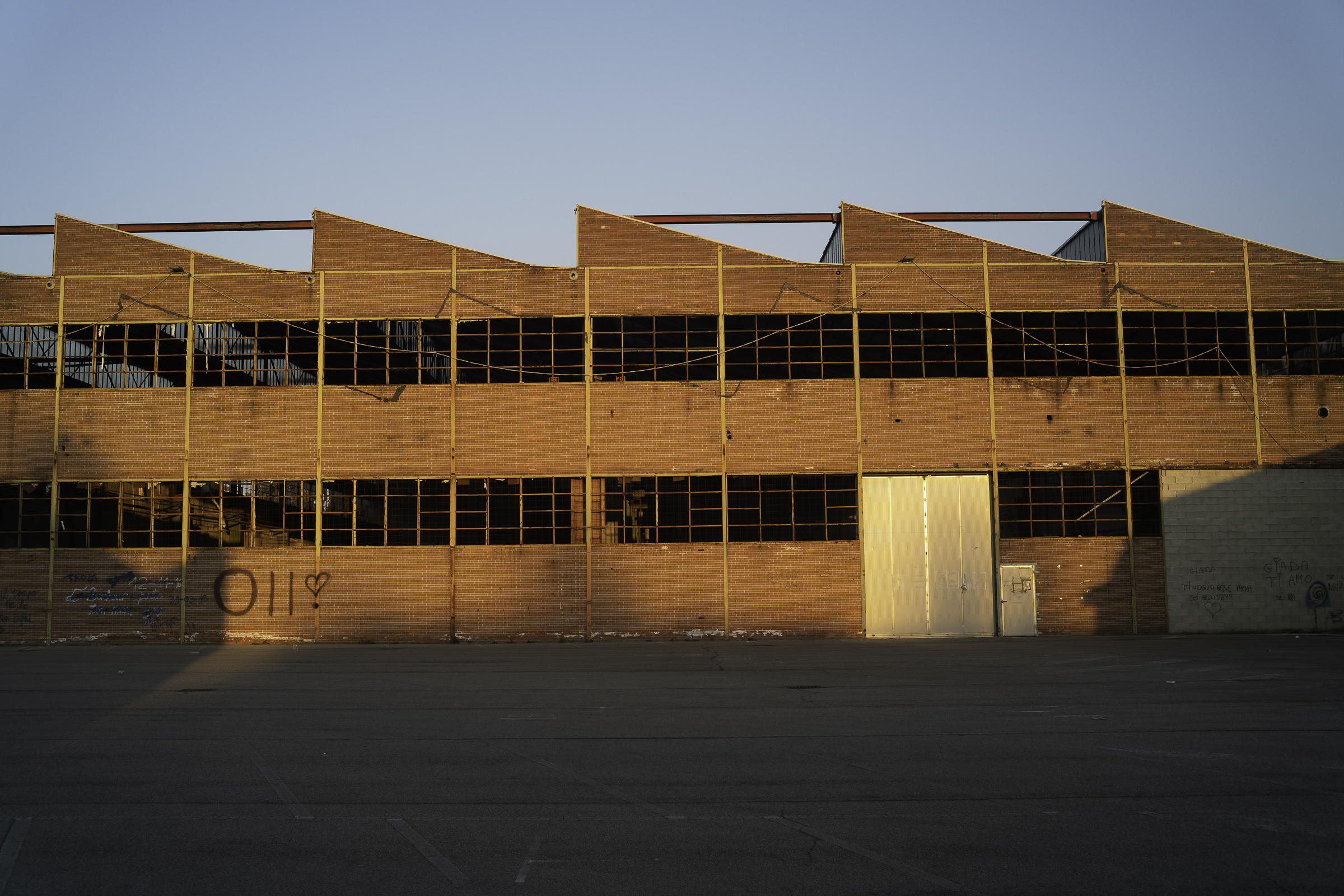 Parte delle aree della Way Assauto sono ora accessibili e utilizzabili.